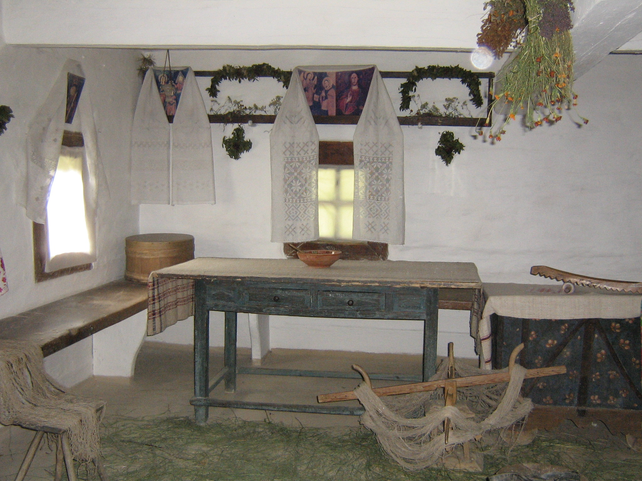 Przykładowe wykorzystanie rusznika.